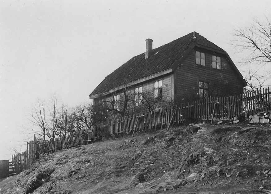 Helverschous løkke i Munkedamsveien 35. Foto: Caroline Colditz, februar 1896. Fra Byhistorisk samling hos Oslo Museum.